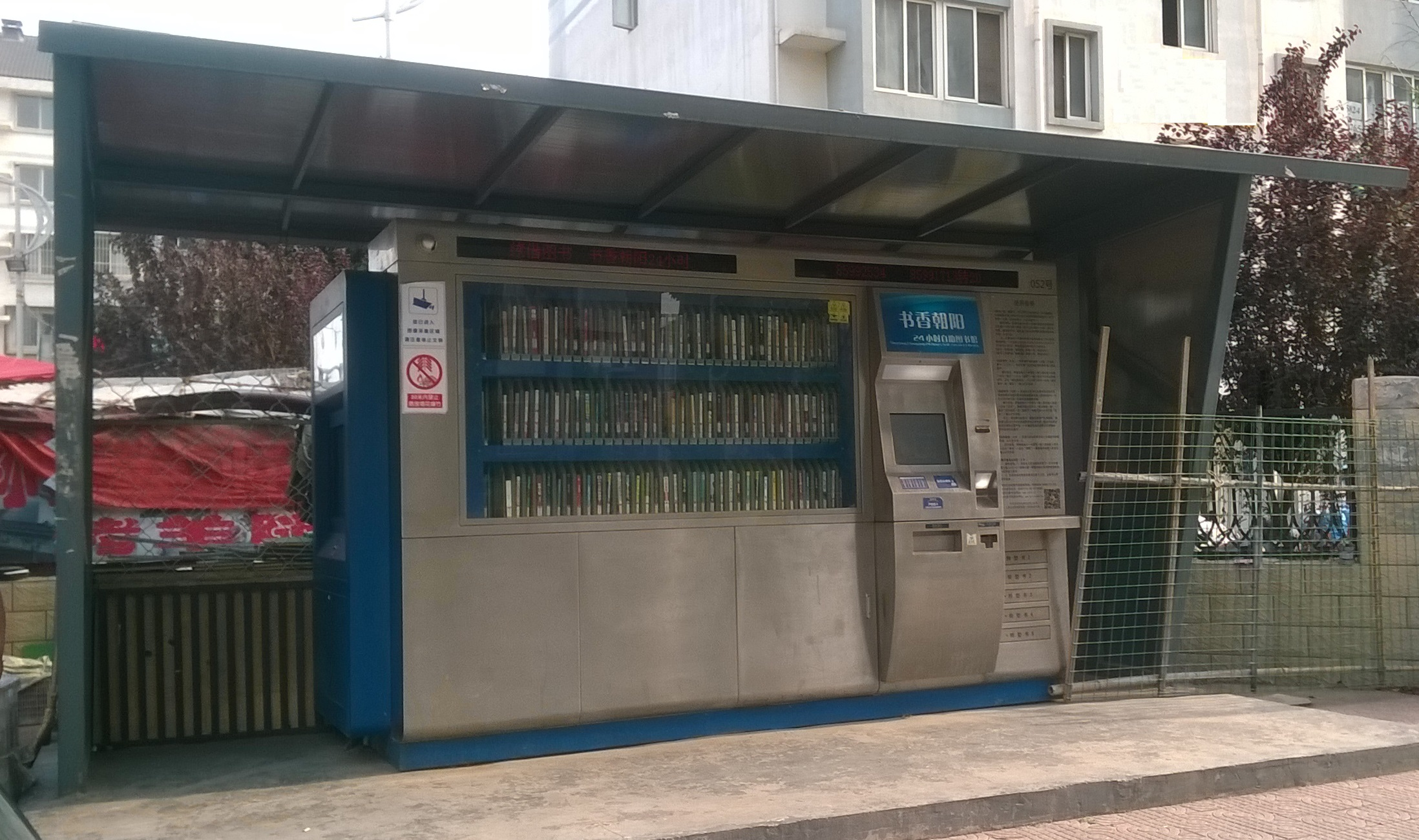 书香朝阳 24小时自助图书馆，摄于中国北京朝阳区。